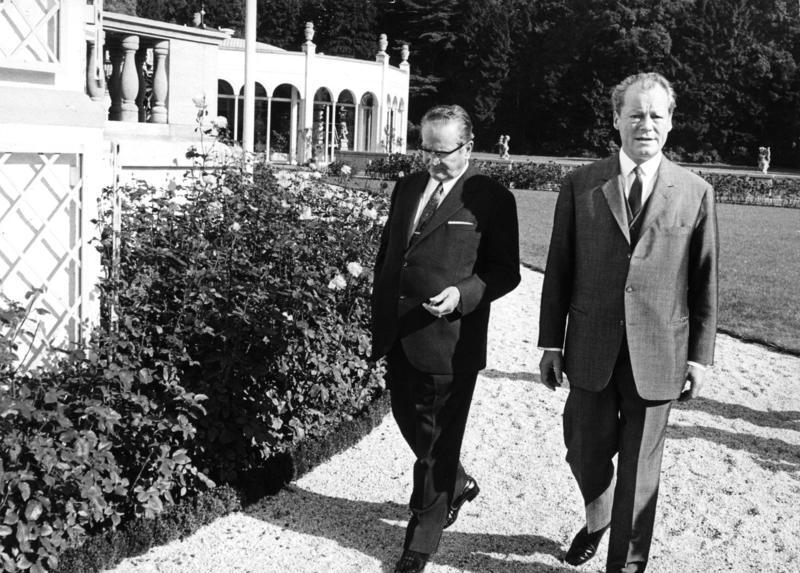 Treffen Bundeskanzler Willy Brandt mit Staatspräsident Tito im Schloß Röttgen